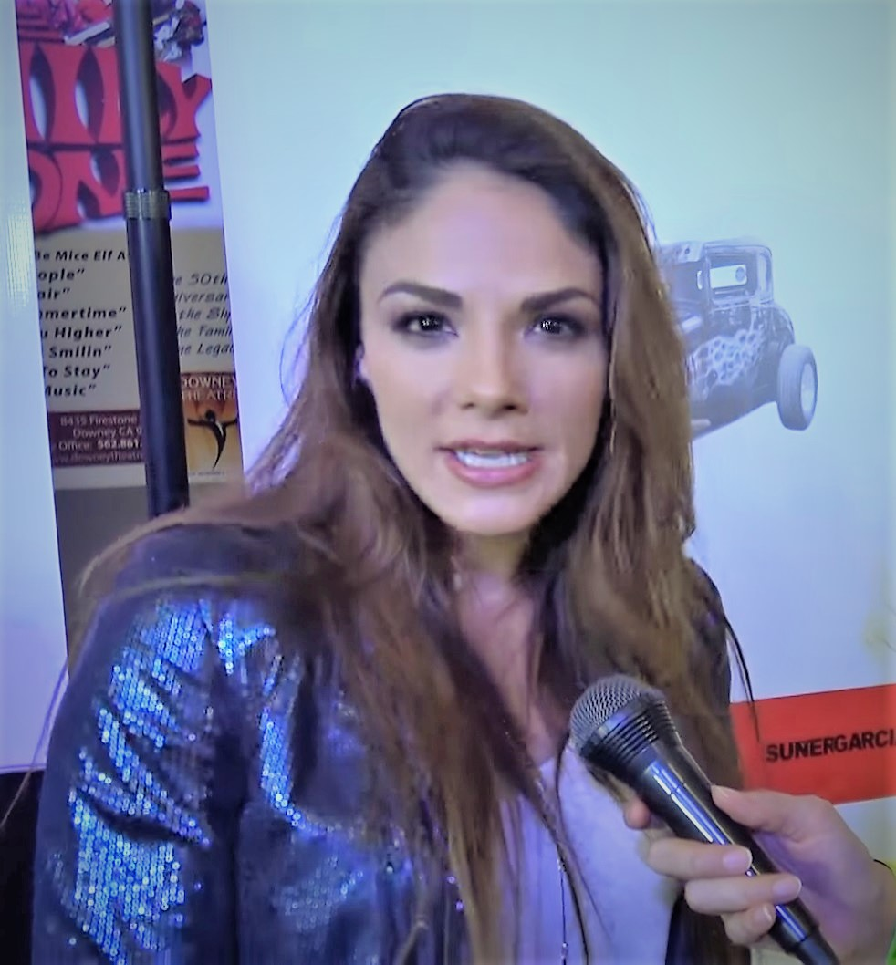 Rossana Nájera nos presenta a su nuevo novio y nos habla de la continuación de la serie "El Chema" by Dulce Osuna